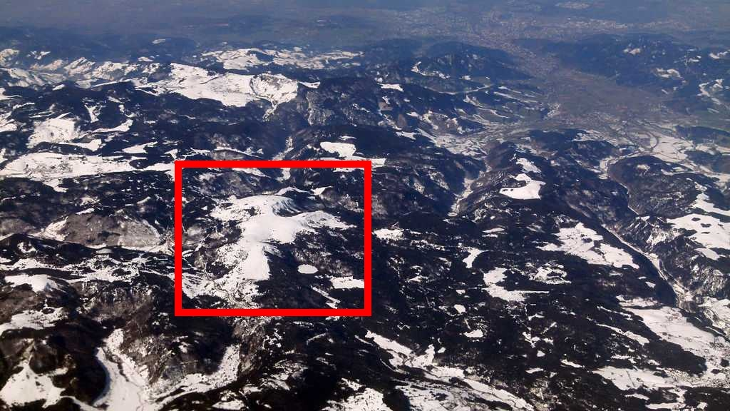 Feldberg im Südschwarzwald, oben rechts: Freiburg